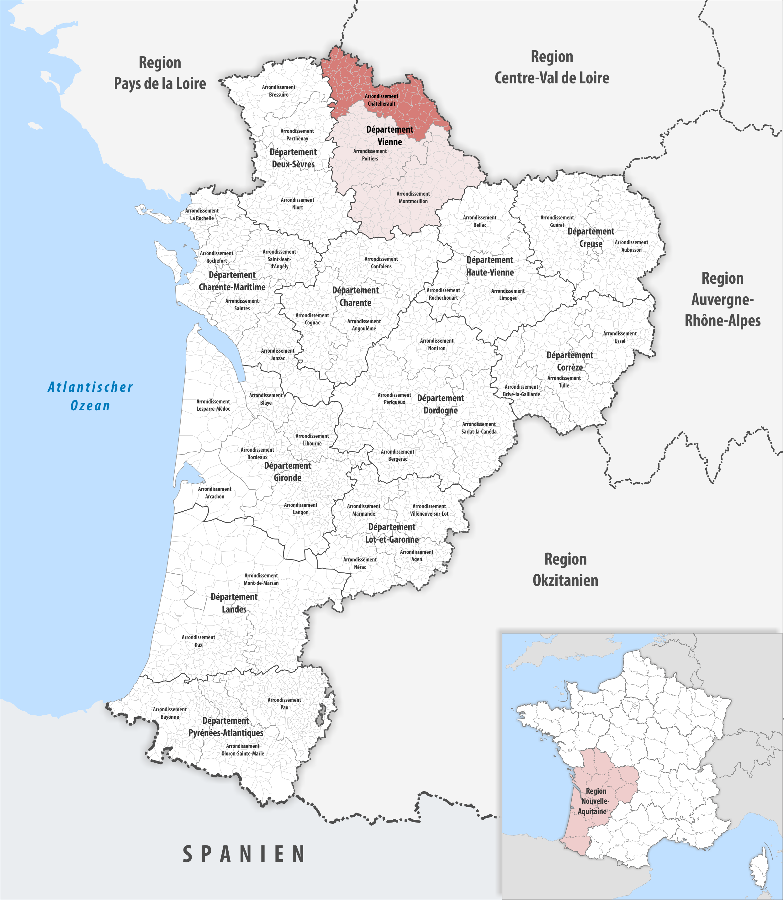 Lage des Arrondissements Châtellerault